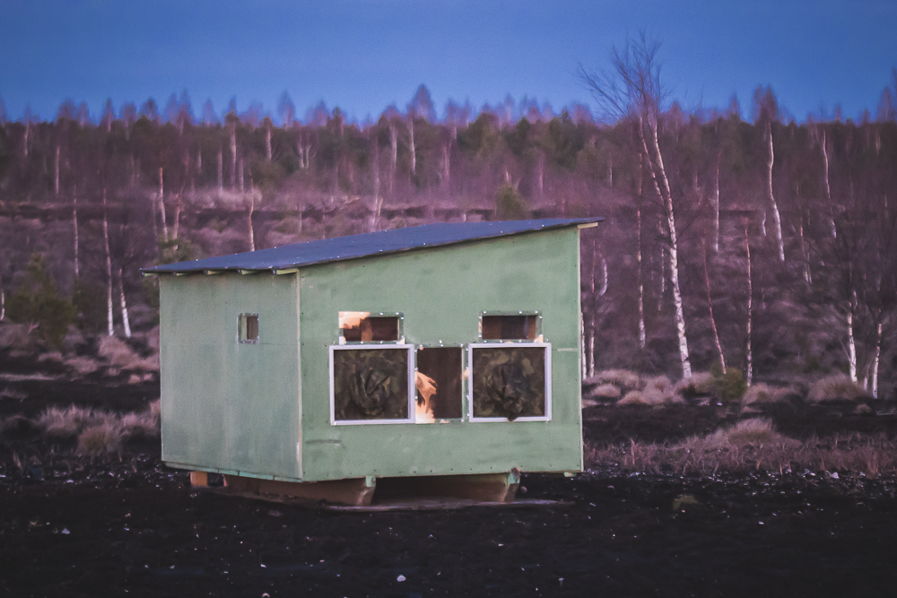 Tetrede pildistamiseks mõeldud fotovarje Saaremaal